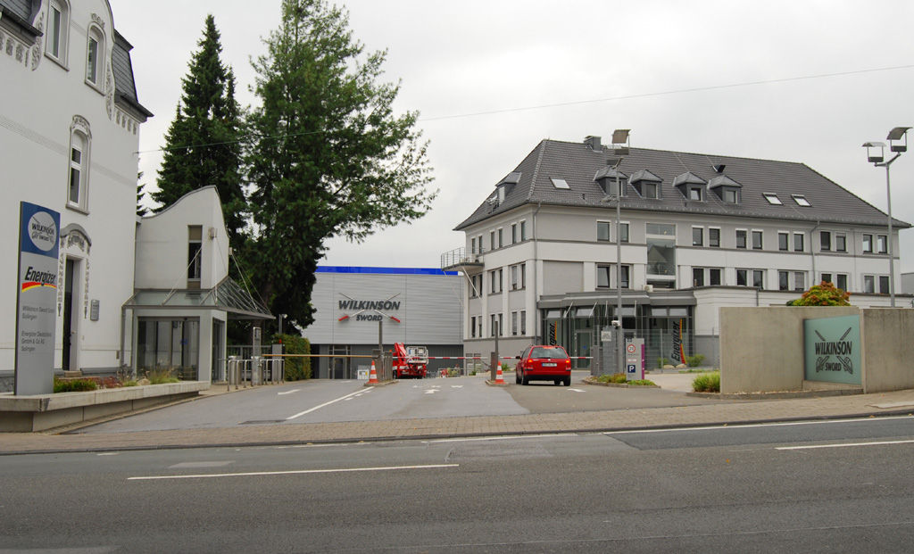 Deutscher Firmensitz von Wilkinson Sword in Solingen (Schützenstraße-Krahenhöhe)